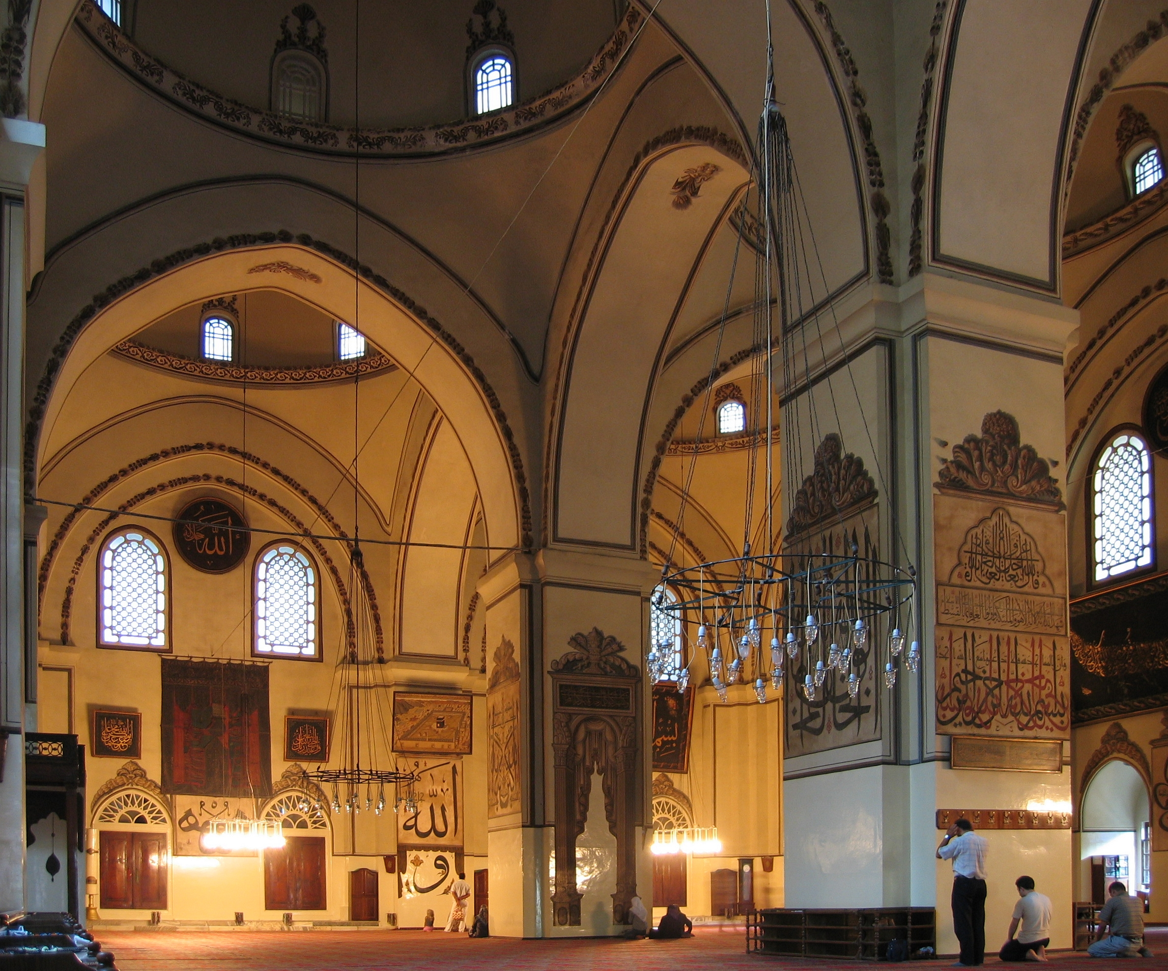 Innenansicht Große Moschee in Bursa